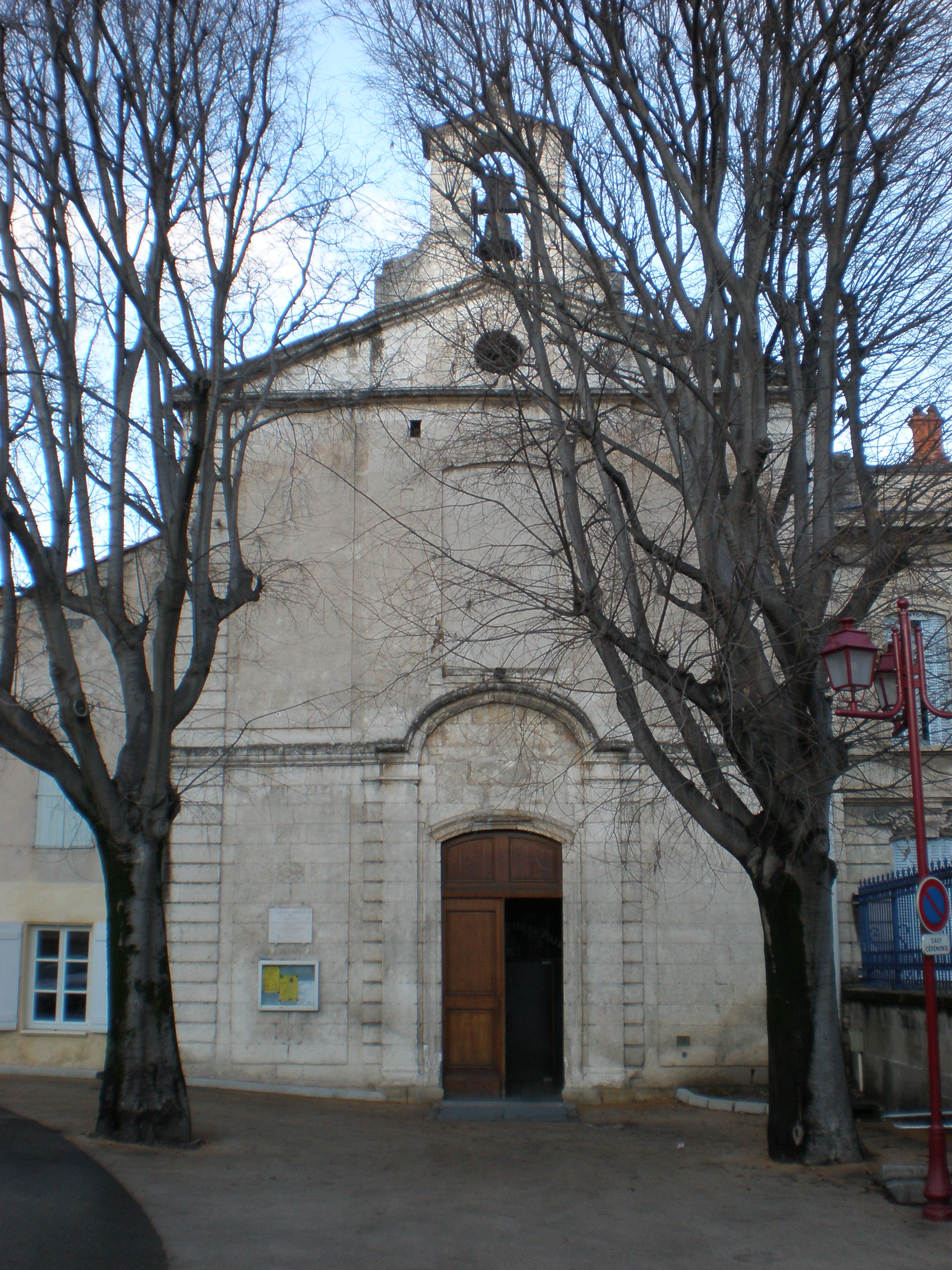 Eglise Saint-Joseph d'Alès (Gard)